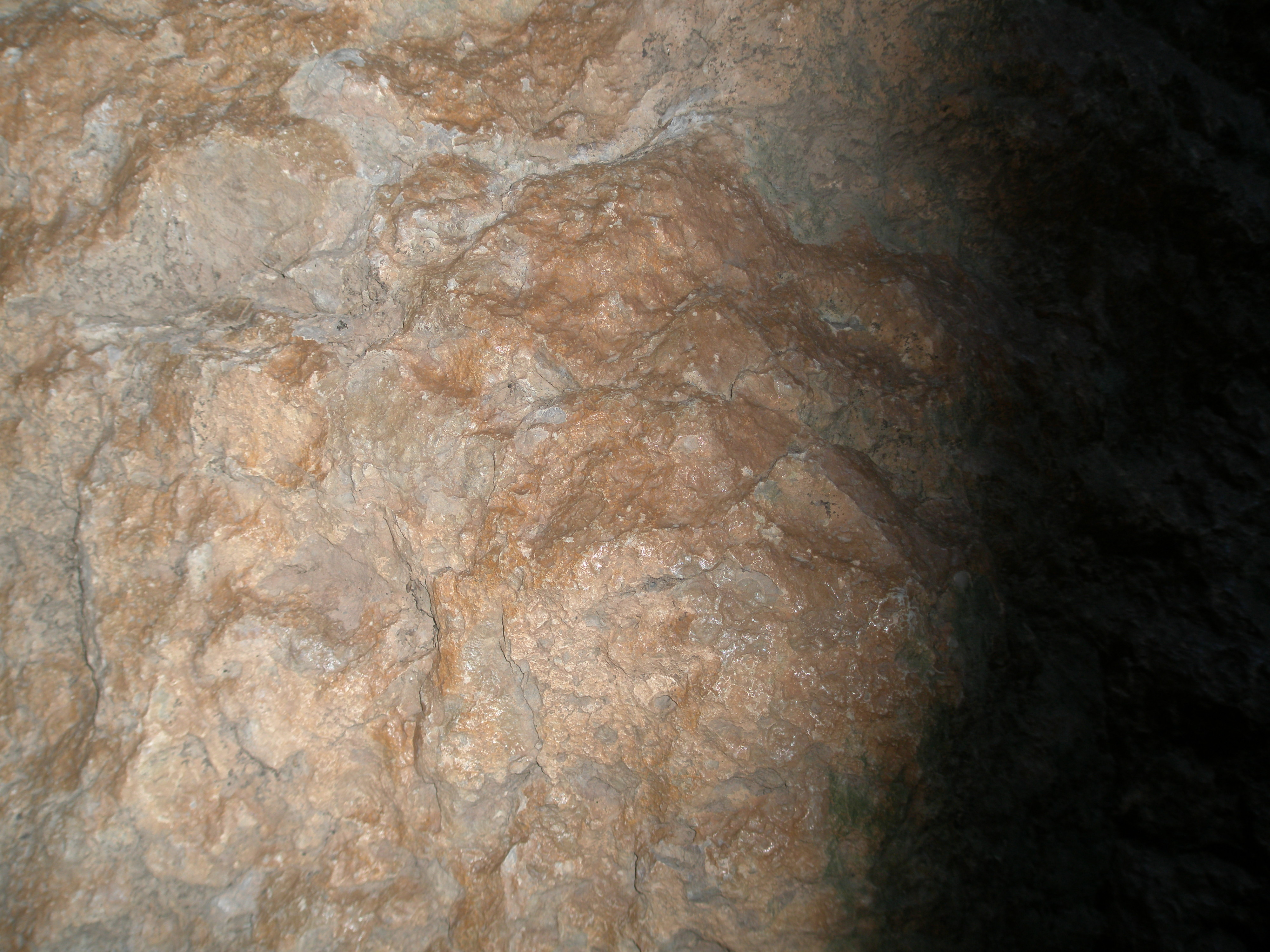 Пещера